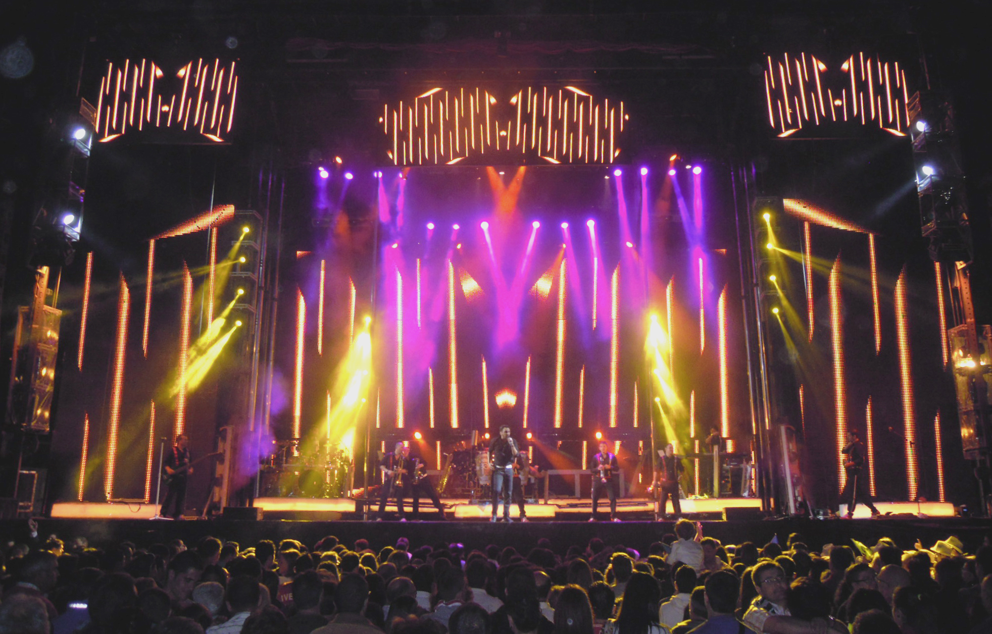 Actuación da Orquestra Panorama na XXXIX Festa do viño tinto do Salnés, en Barrantes (Ribadumia)